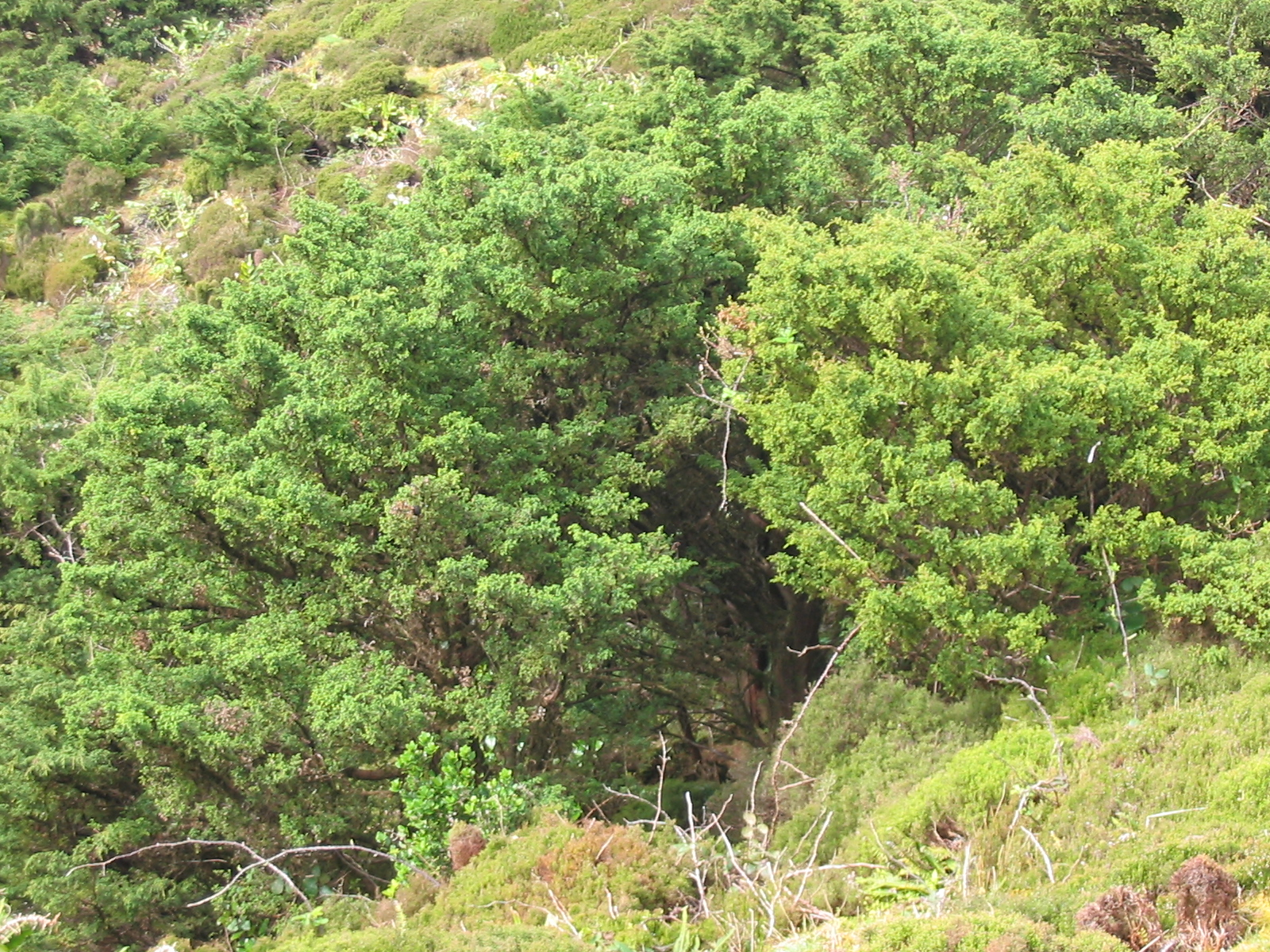 Kleinblättriger Wacholder (Juniperus brevifolia) - Habitus